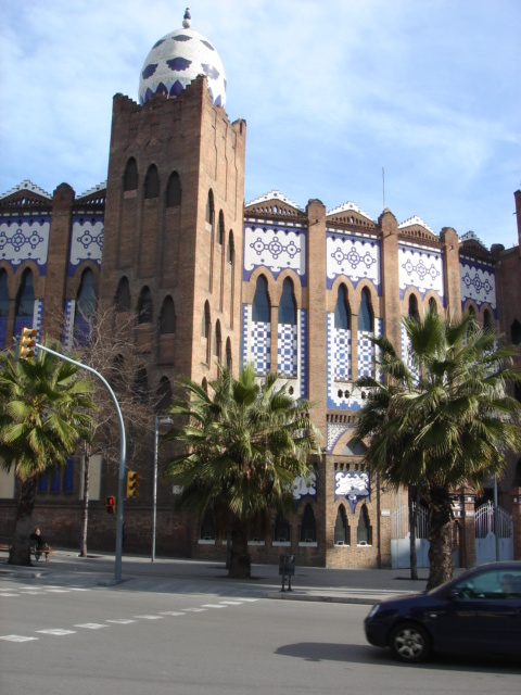 Plaza de toros Monumental, Barcelona, España.